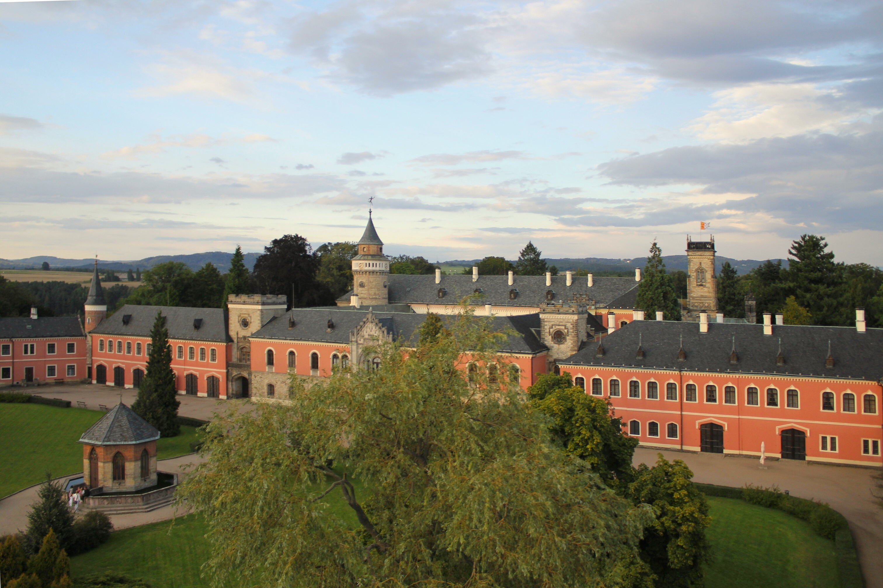 Zámek Sychrov ze vzduchu